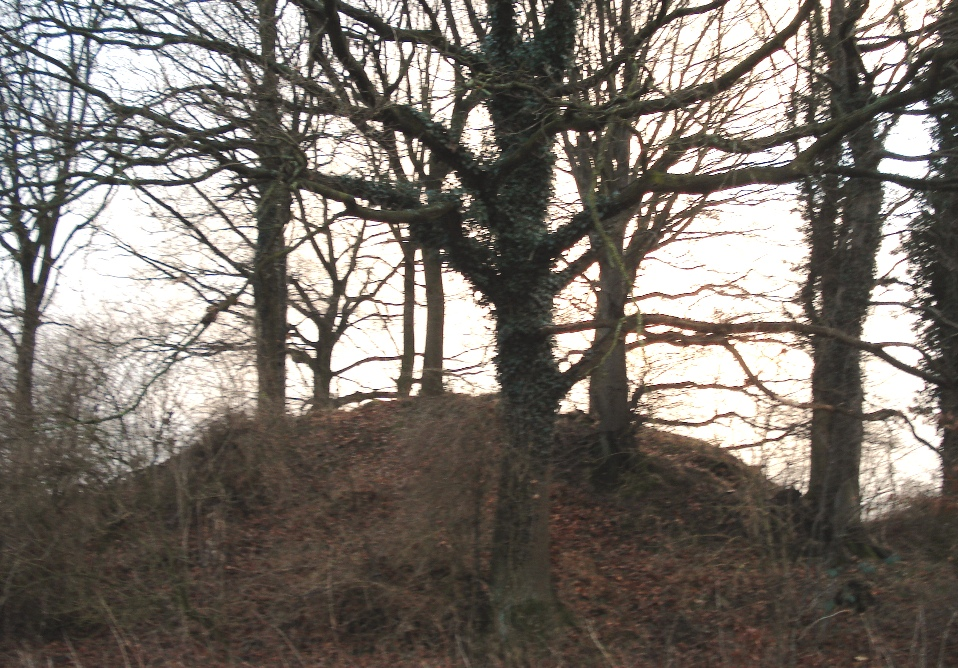 Der Wittwieverbarg